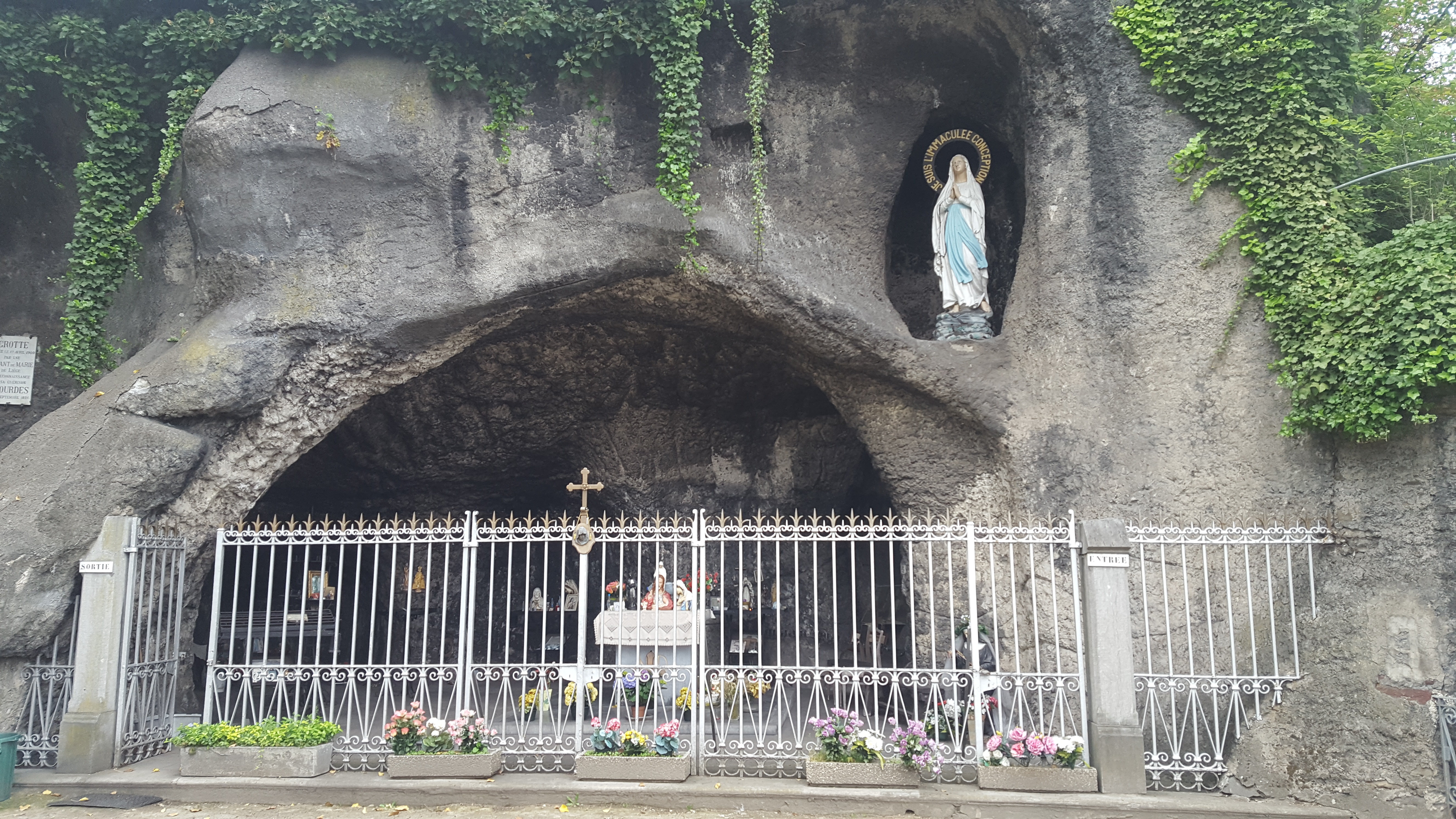 Église Notre-Dame de Lourdes à Le Bouhay, Bressoux, Belgique